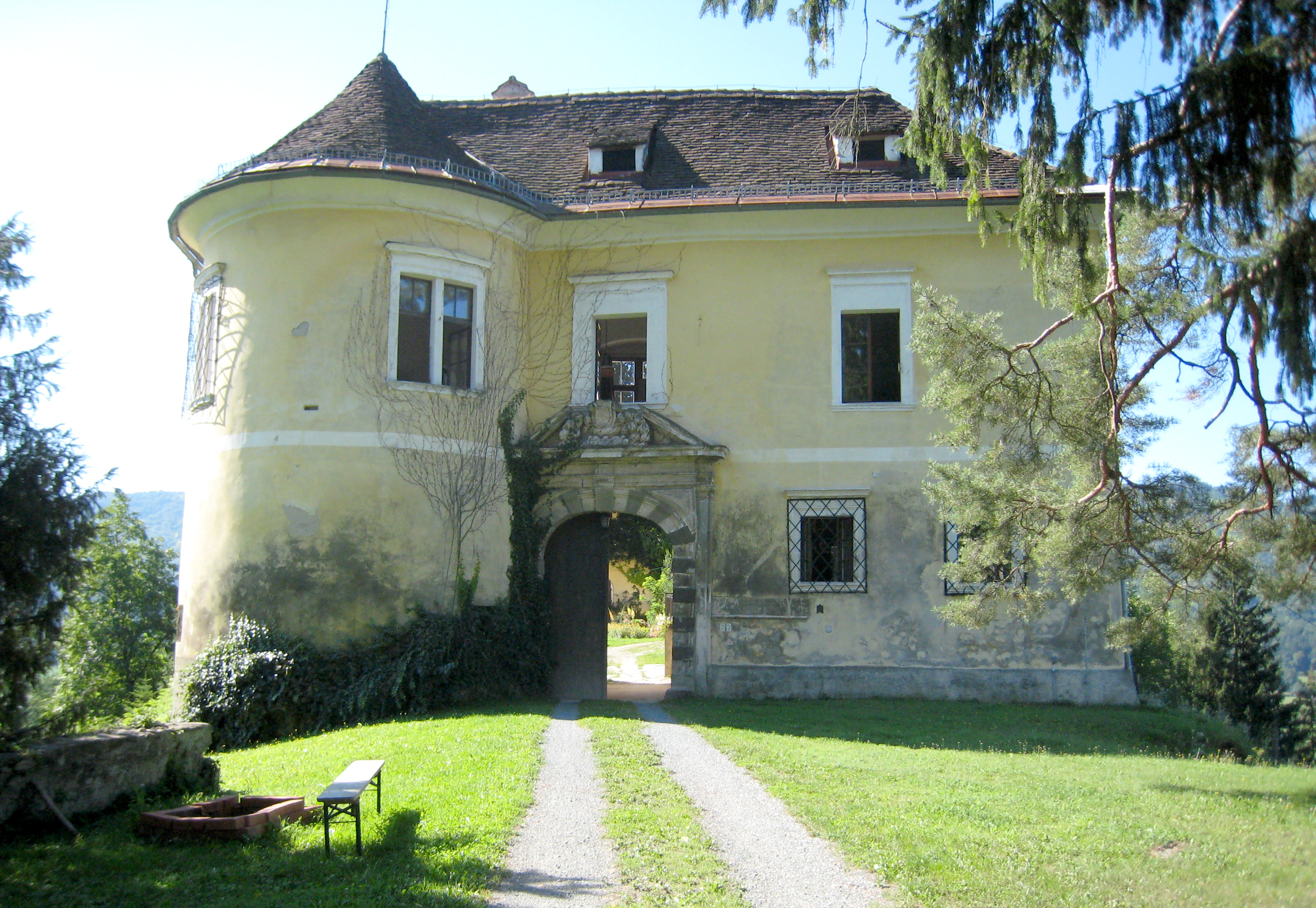 Schloss/Burg Arnfels